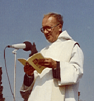 afbeelding Dom Aubert-Tillo van Biervliet, benedictijnmonnik in Steenbrugge